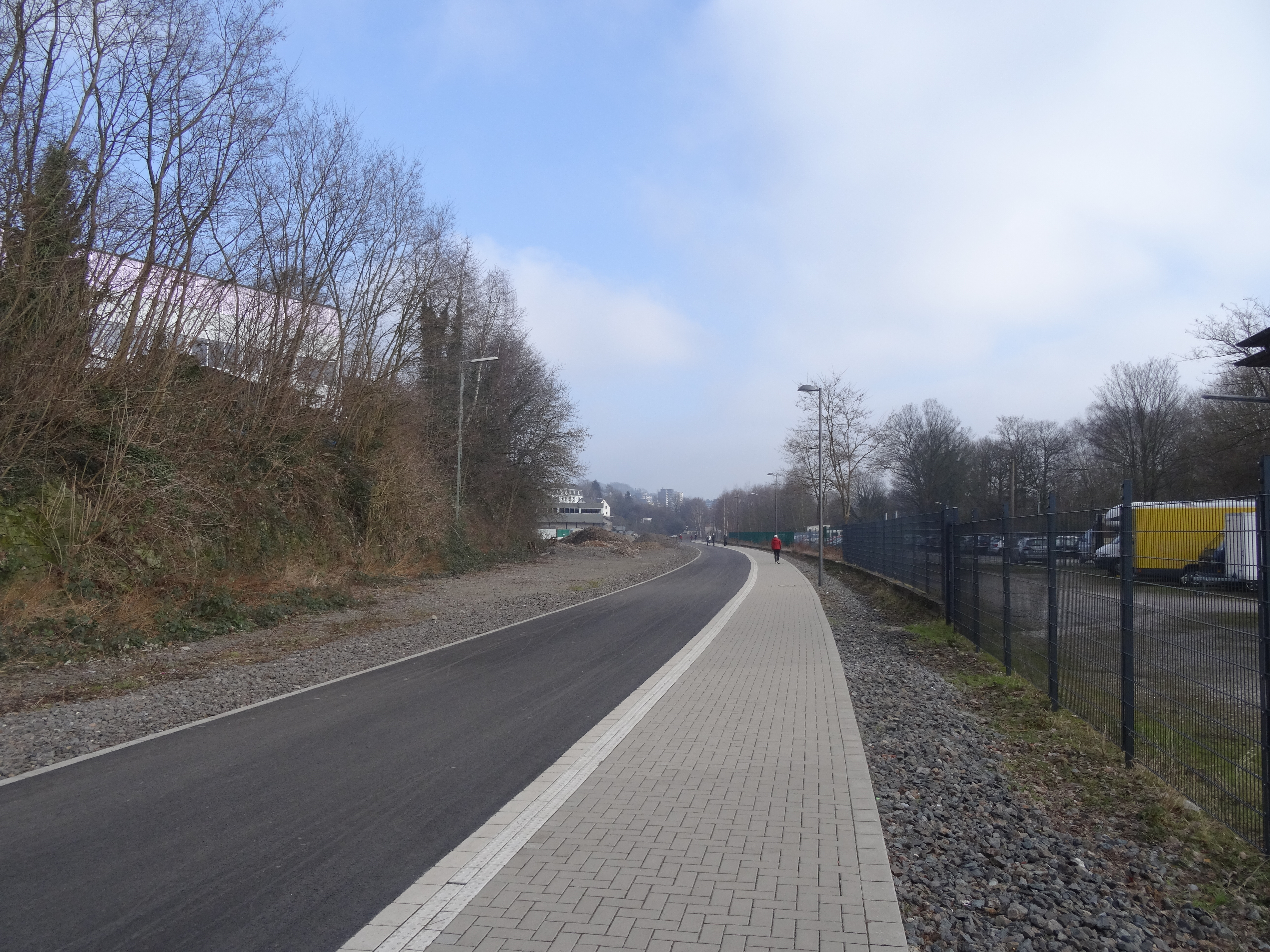 Radweg auf der ehemaligen Bahnstrecke Düsseldorf-Derendorf–Dortmund Süd in Wuppertal, Richtung Osten